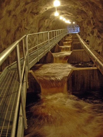 Die Fischtreppe in Gottne, Gemeinde Örnsköldsvik, Schweden.